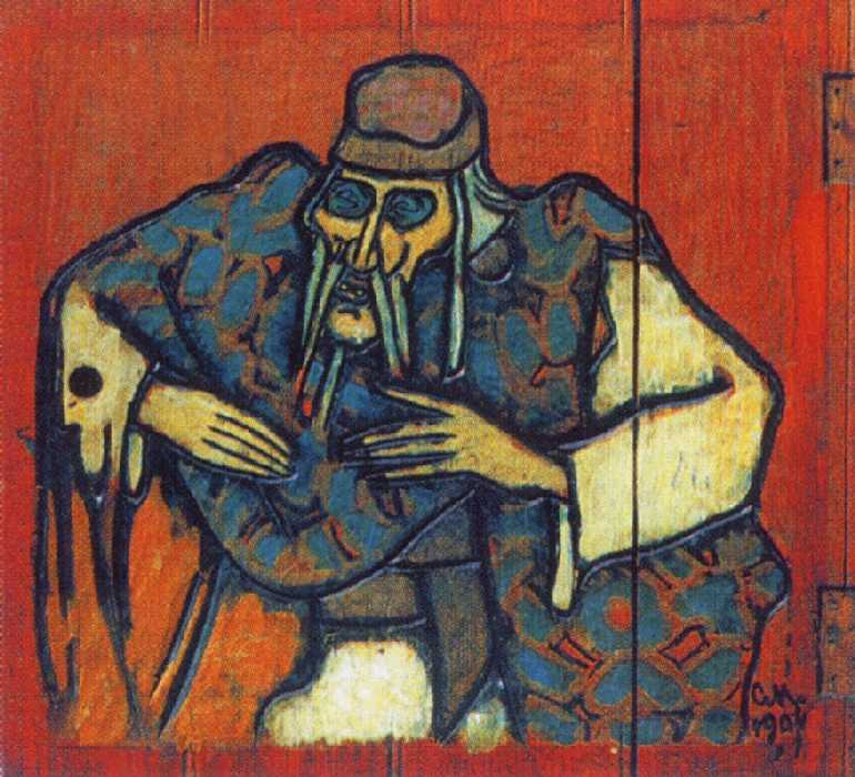 Малютин Сергей Васильевич. Масло Кащей. 1904г.